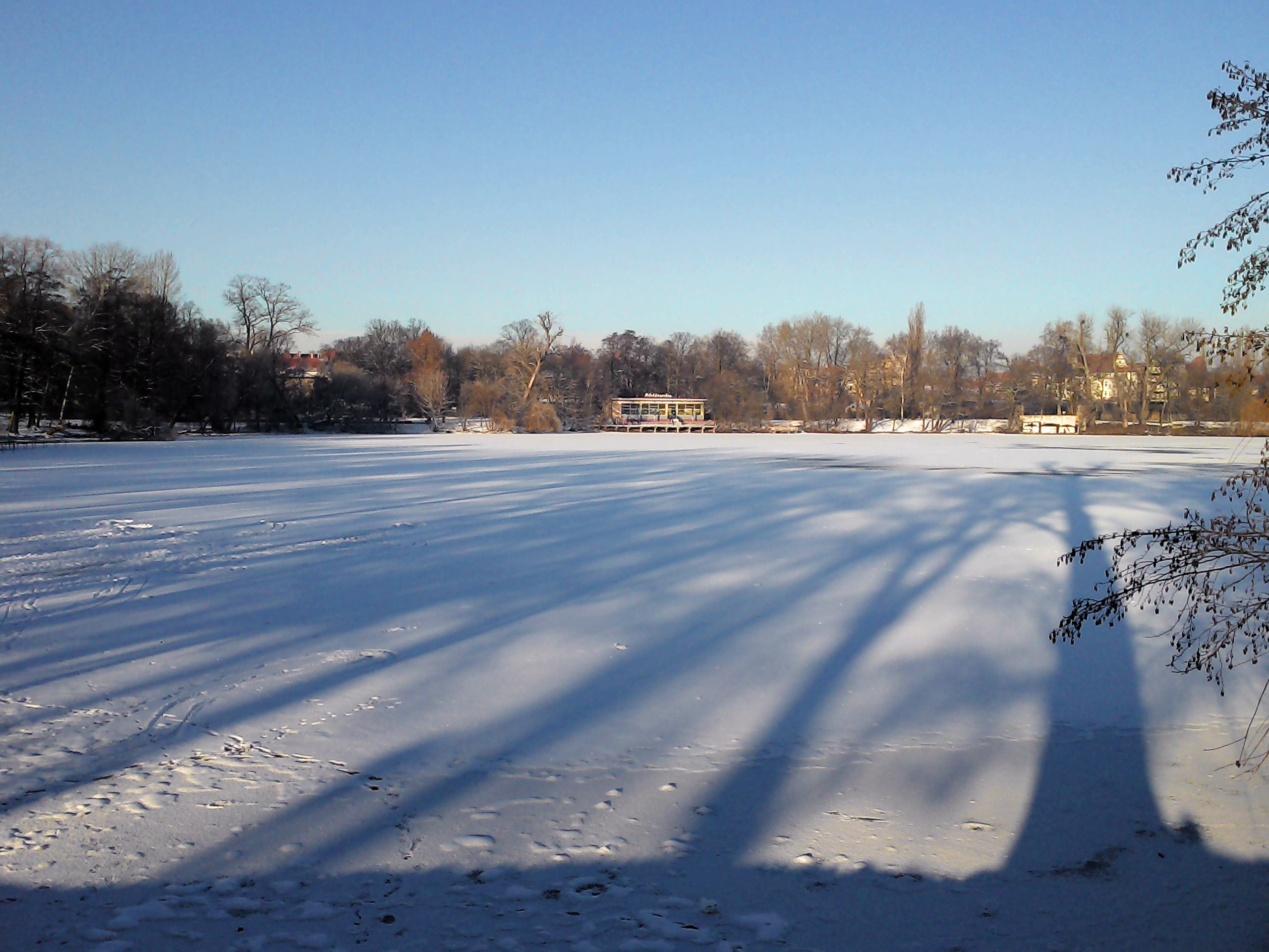 Der Weißensee in Berlin-Weißensee im Januar 2016.